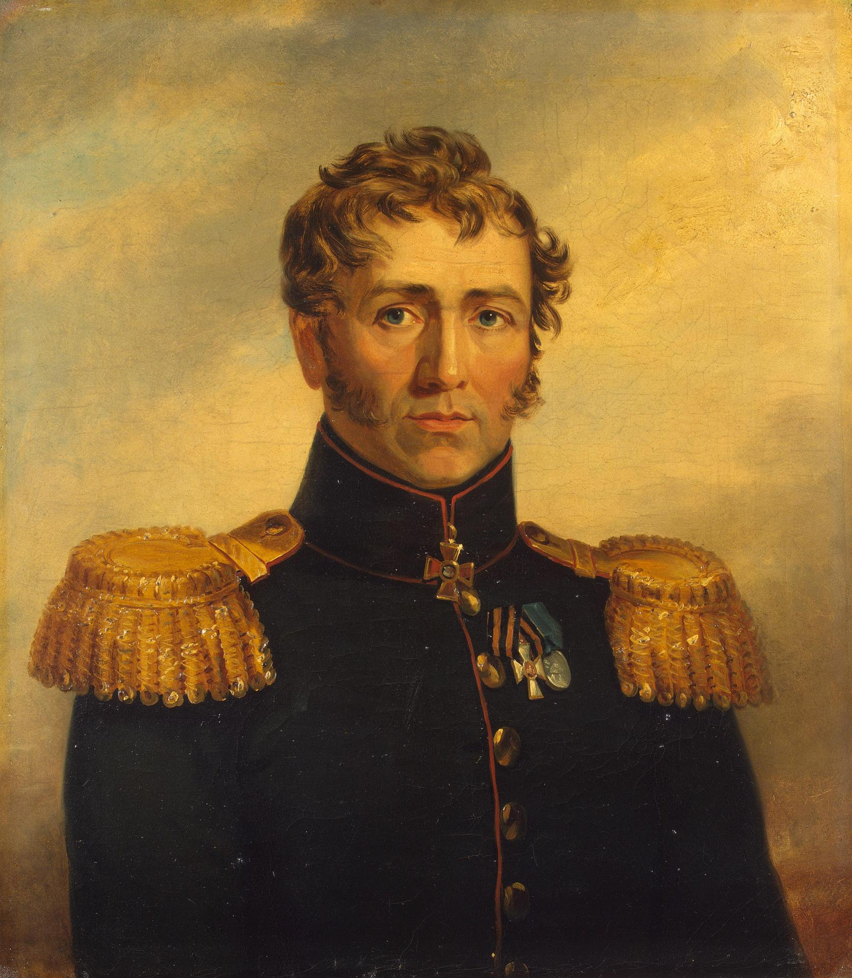 Yakov Yegorovich Gine (1769 – 06.10.1813) russian general